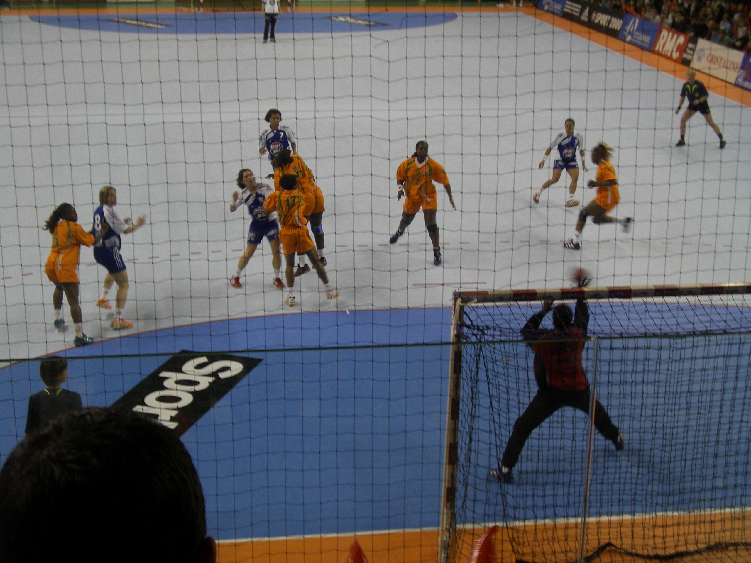 Match de hand féminin : gala de la coupe du monde 2007 à Nimes